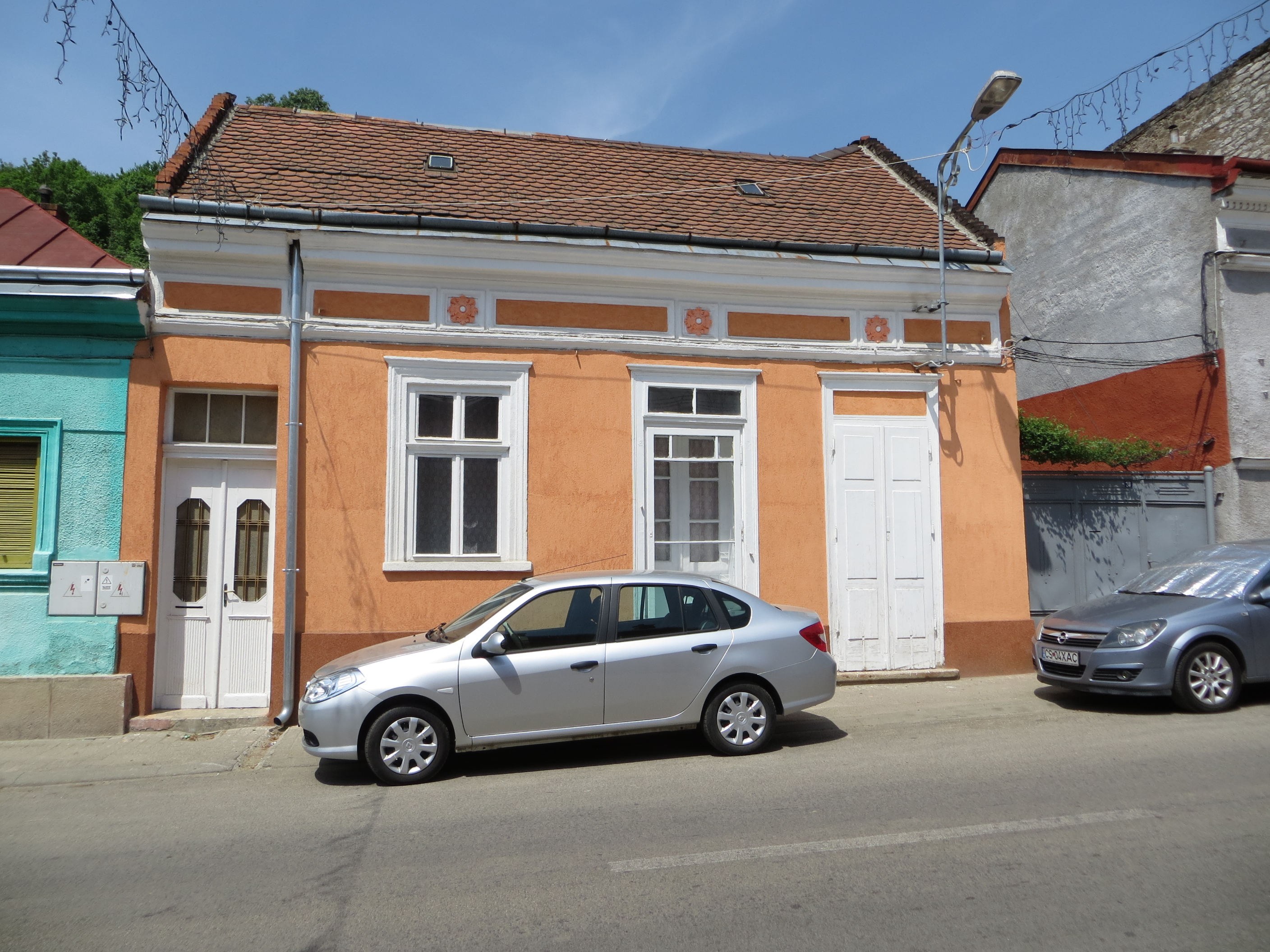 Casa Tinichigiului, cu poarta, azi locuințe